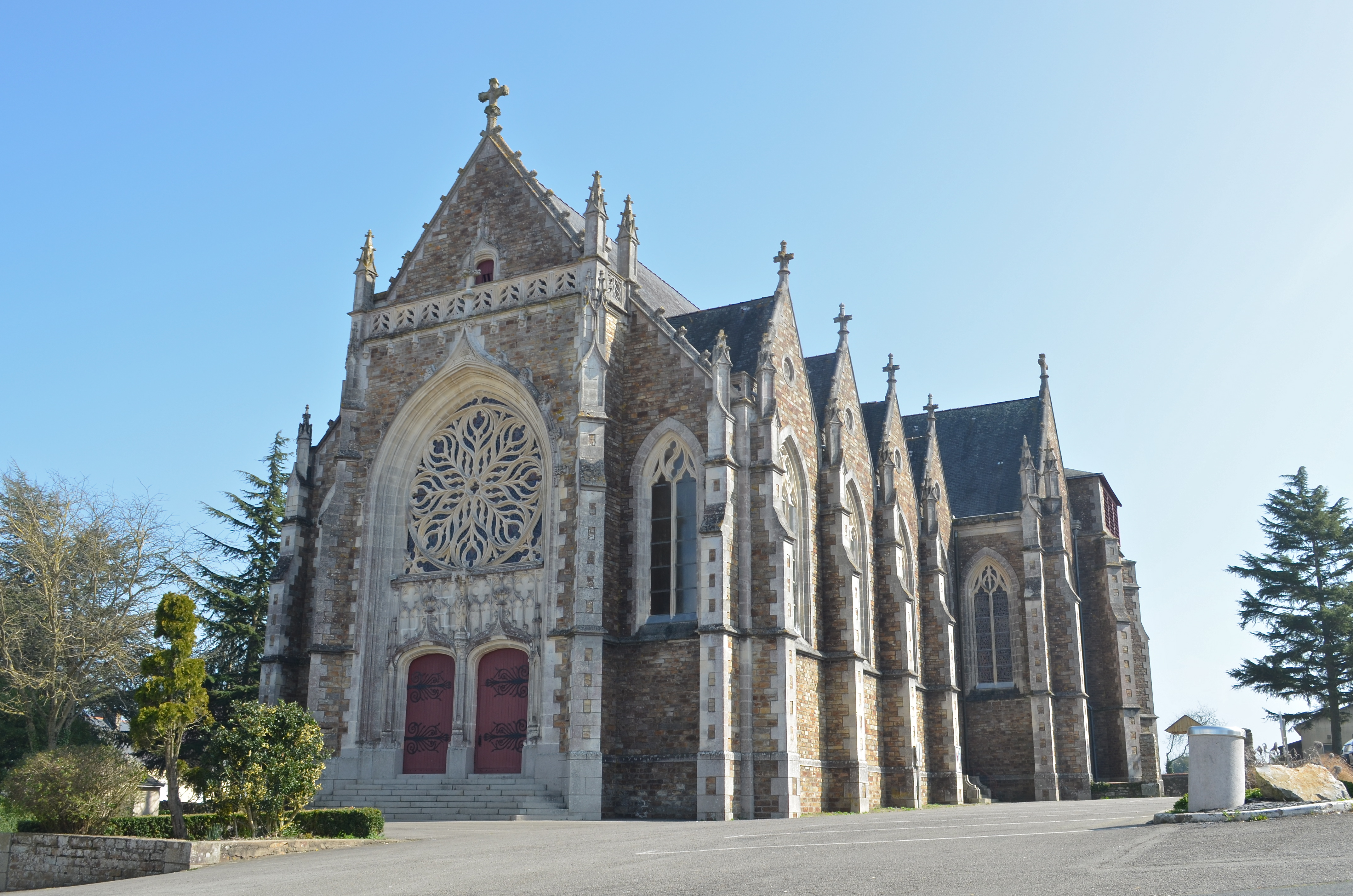 Eglise de Rouans - Loire-Atlantique